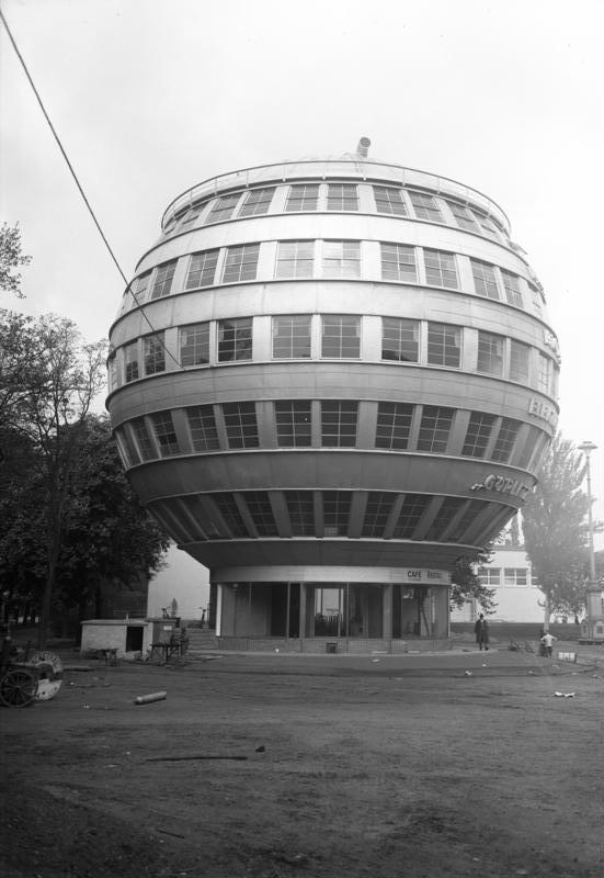 Das erste deutsche Kugelhaus wird vollständig renoviert! Das erste deutsche Kugelhaus, das einzige der Welt, ist anläßlich der Hygiene-Ausstellung in Dresden einer vollständigen Renovierung unterzogen worden. Blick auf das Kugelhaus auf dem Ausstellungsgelände in Dresden.